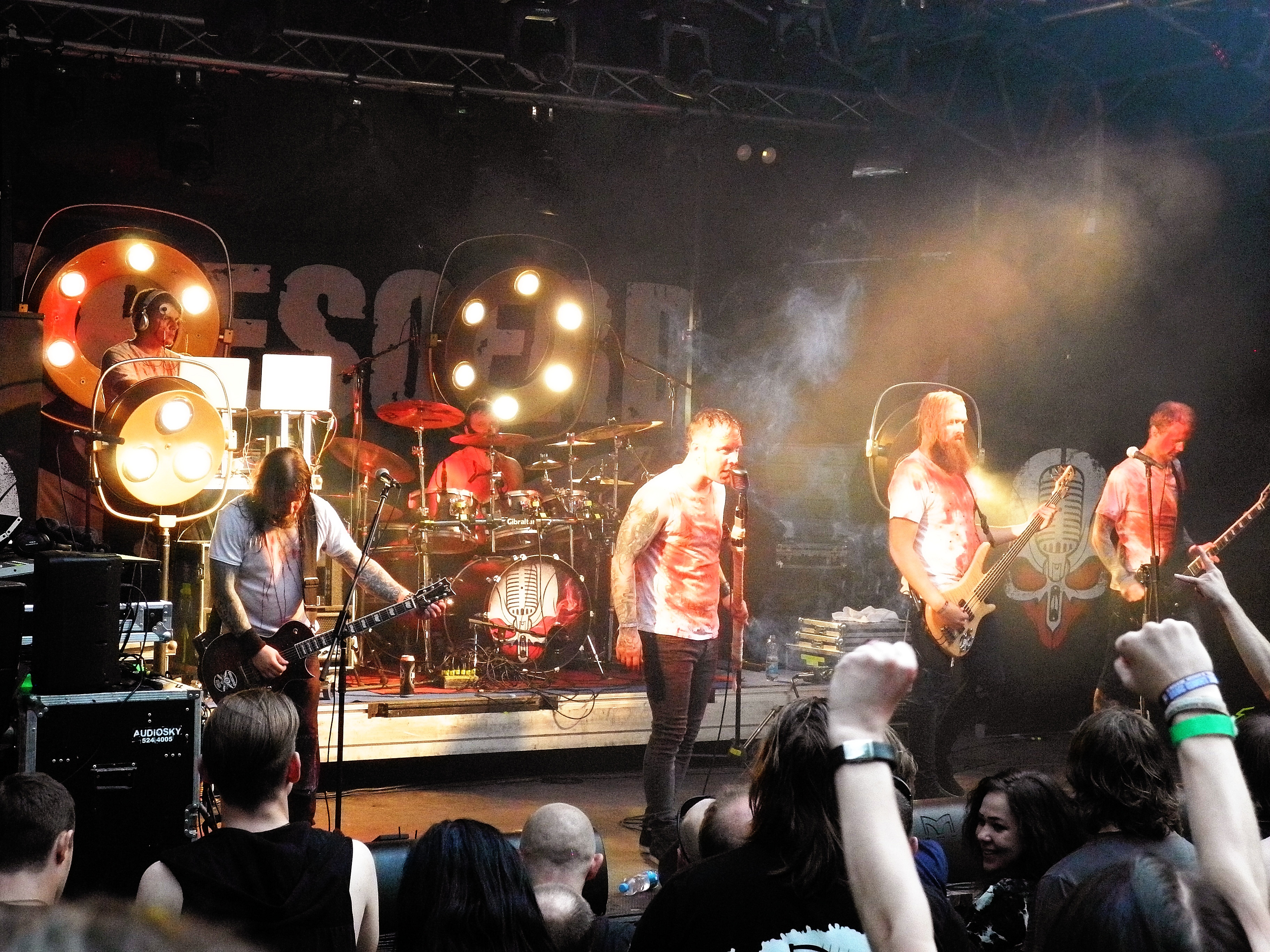 Goresoerd muusikafestivalil Hard Rock Laager 2016.